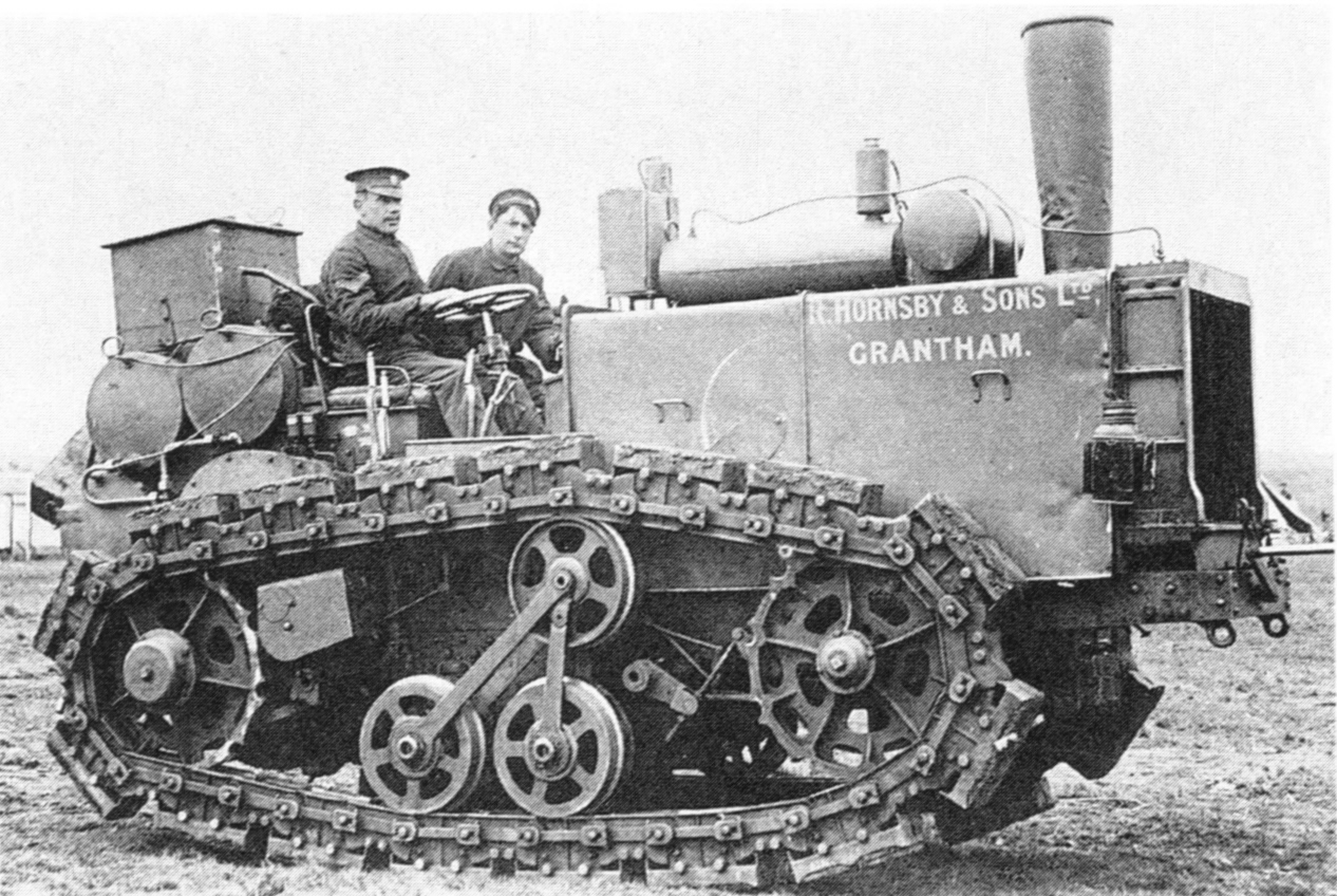 Digitale reproductie foto van de Hornsbytractor